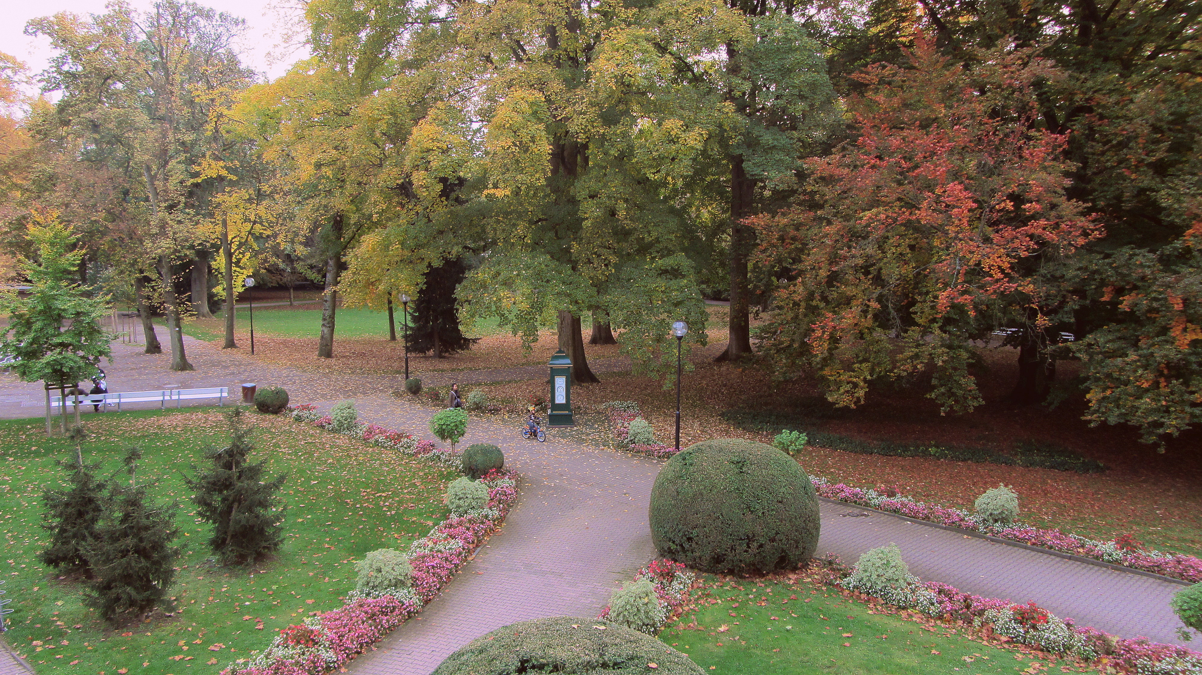 Herbststimmung im Alten Kurpark, Bad Soden am Taunus